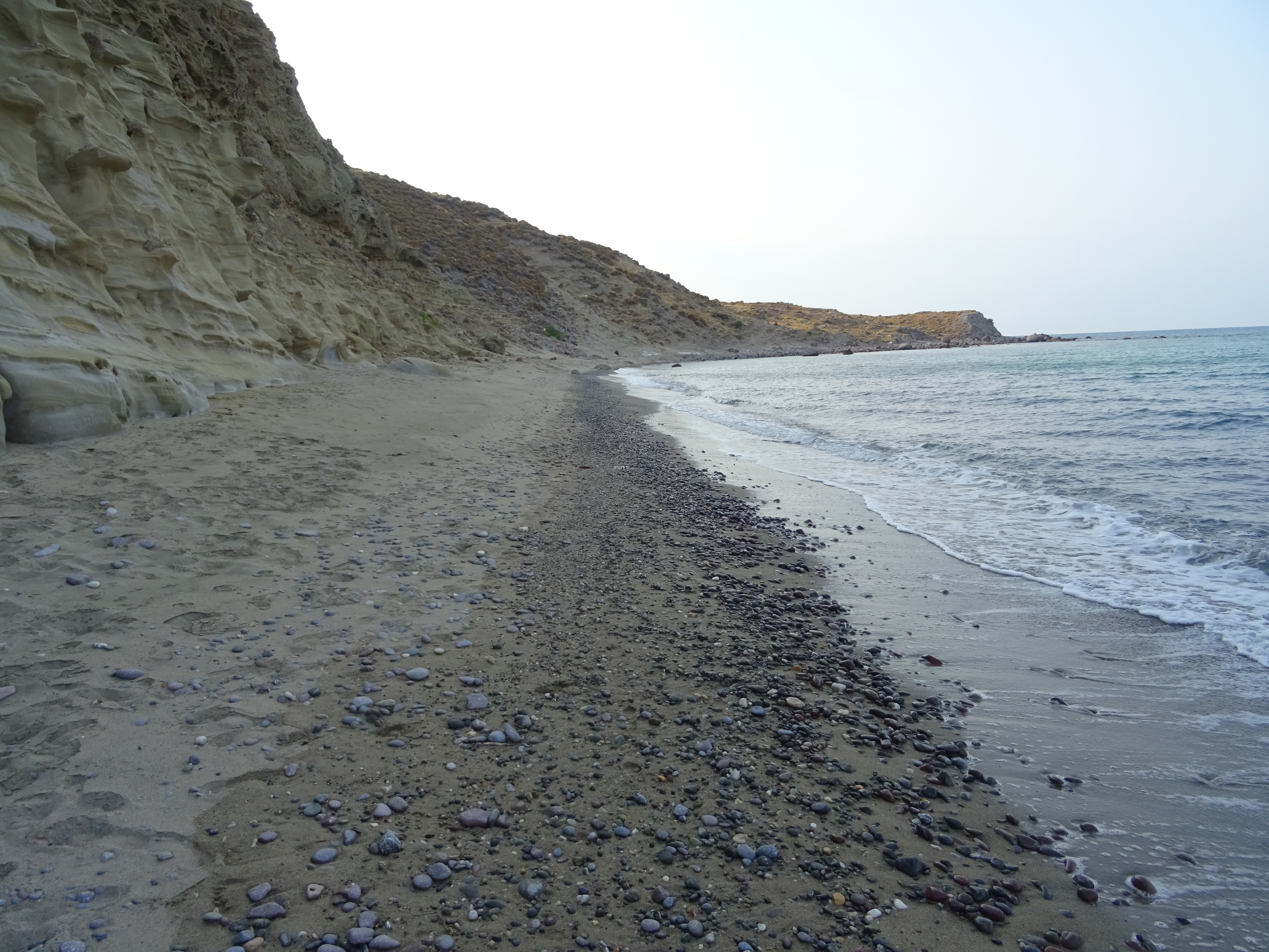 Εκεί που σκάει το κύμα αν ψάξεις προσεκτικά θα βρεις δεκάδες "μάτια της θάλασσας". Η ιδιότητα αυτού του κοχυλιού είναι να προστατεύει το στόμιο του όστρακου, σαν "πώμα", δηλαδή την μόνη είσοδο/έξοδό του, την μόνη εκτεθειμένη του πλευρά. This is a photography of Natura 2000 protected area with ID GR4110002